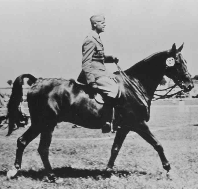 Gustaf Adolf "Gösta" Boltenstern, Jr. (15 May 1904 – 31 March 1995)